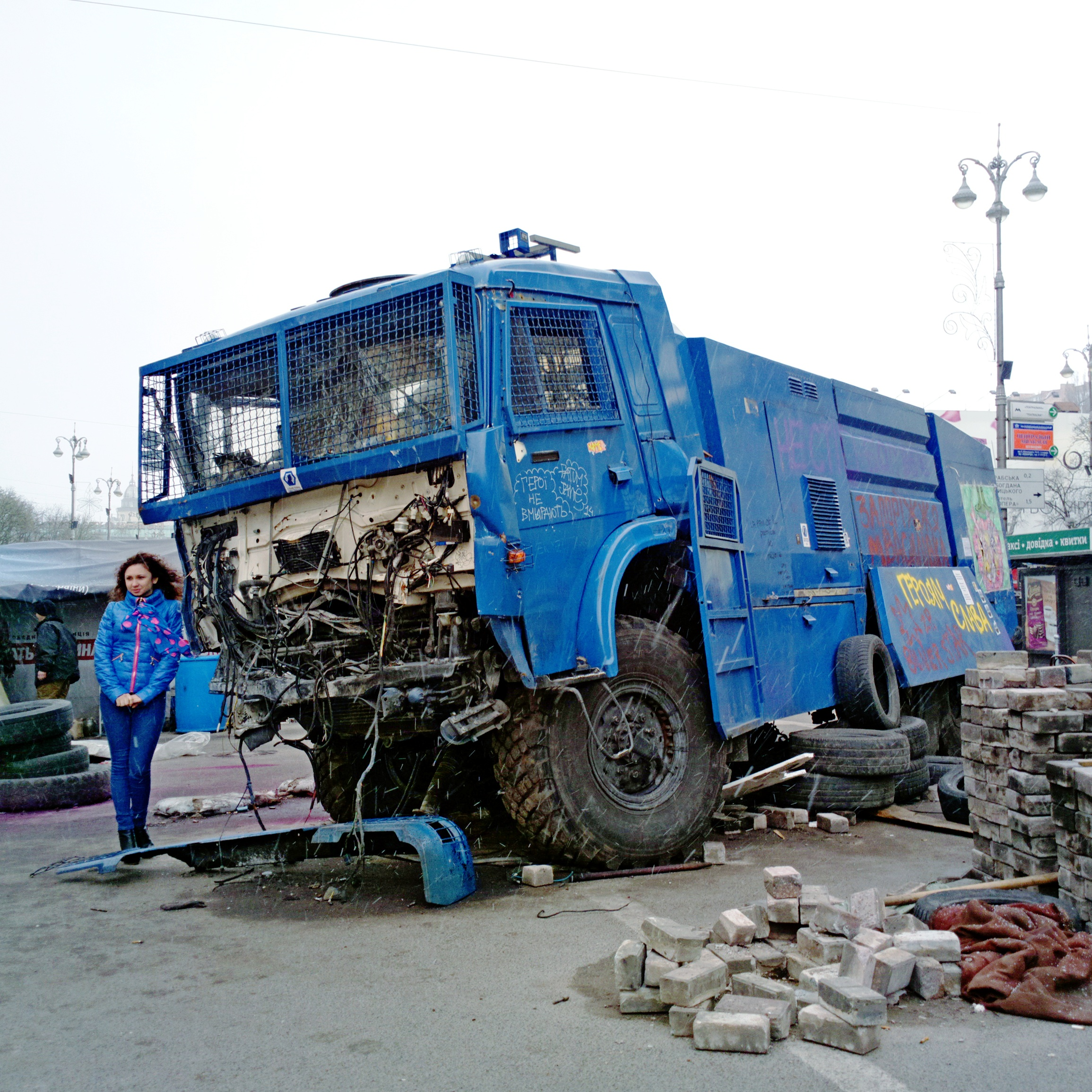 maidan 2014-04-01-1031